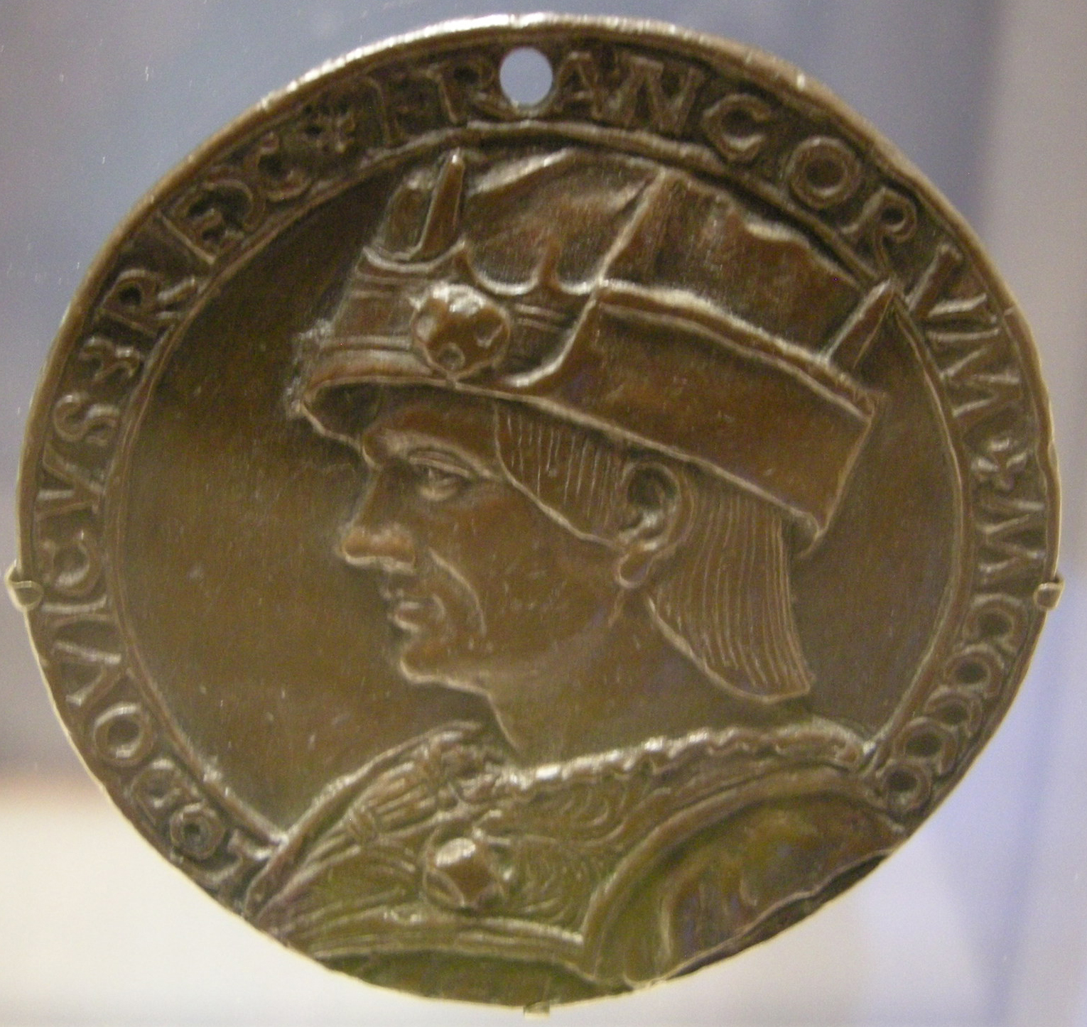 Artista francese, luigi XII, 1500 circa, recto